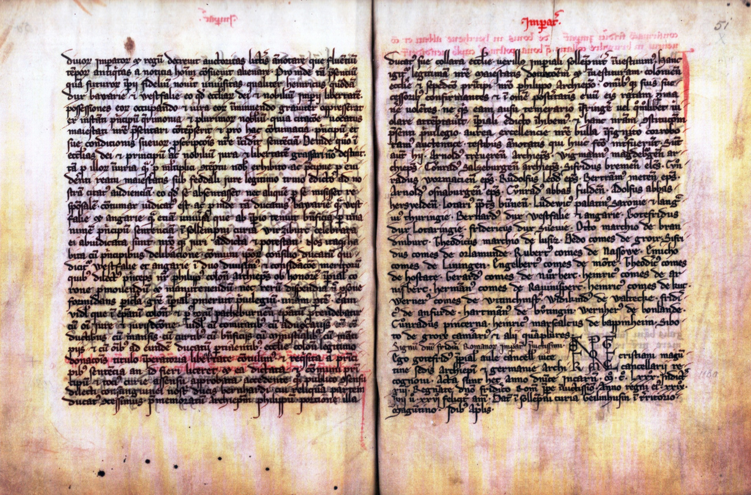 Gelnhäuser Urkunde. Reproduktion der Abschrift im historischen Archiv der Stadt Köln (29x42 cm)